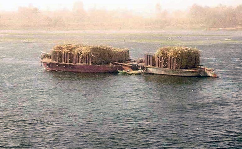 Nile transport